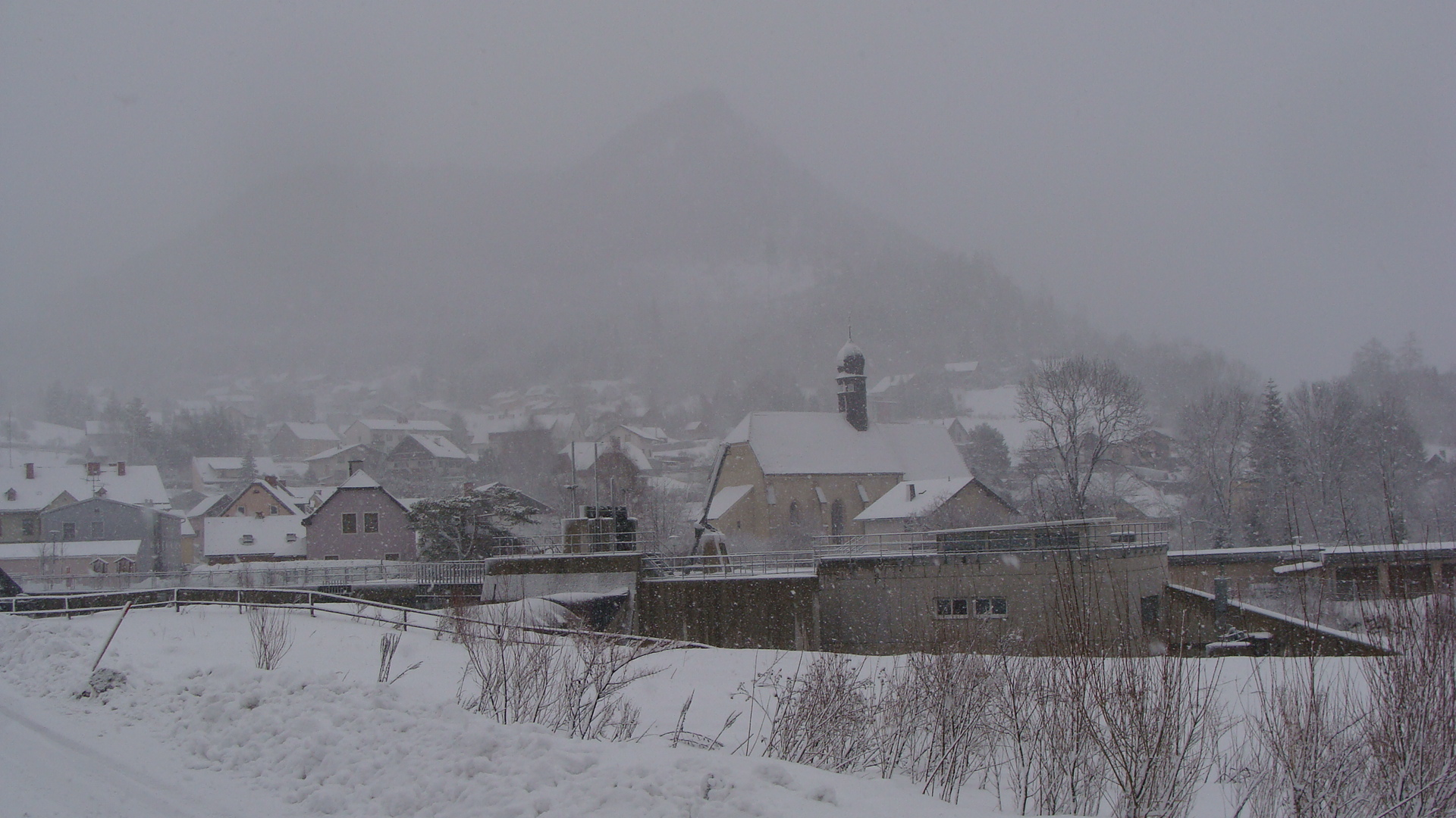 Neuberg an der Mürz im Winter 2012